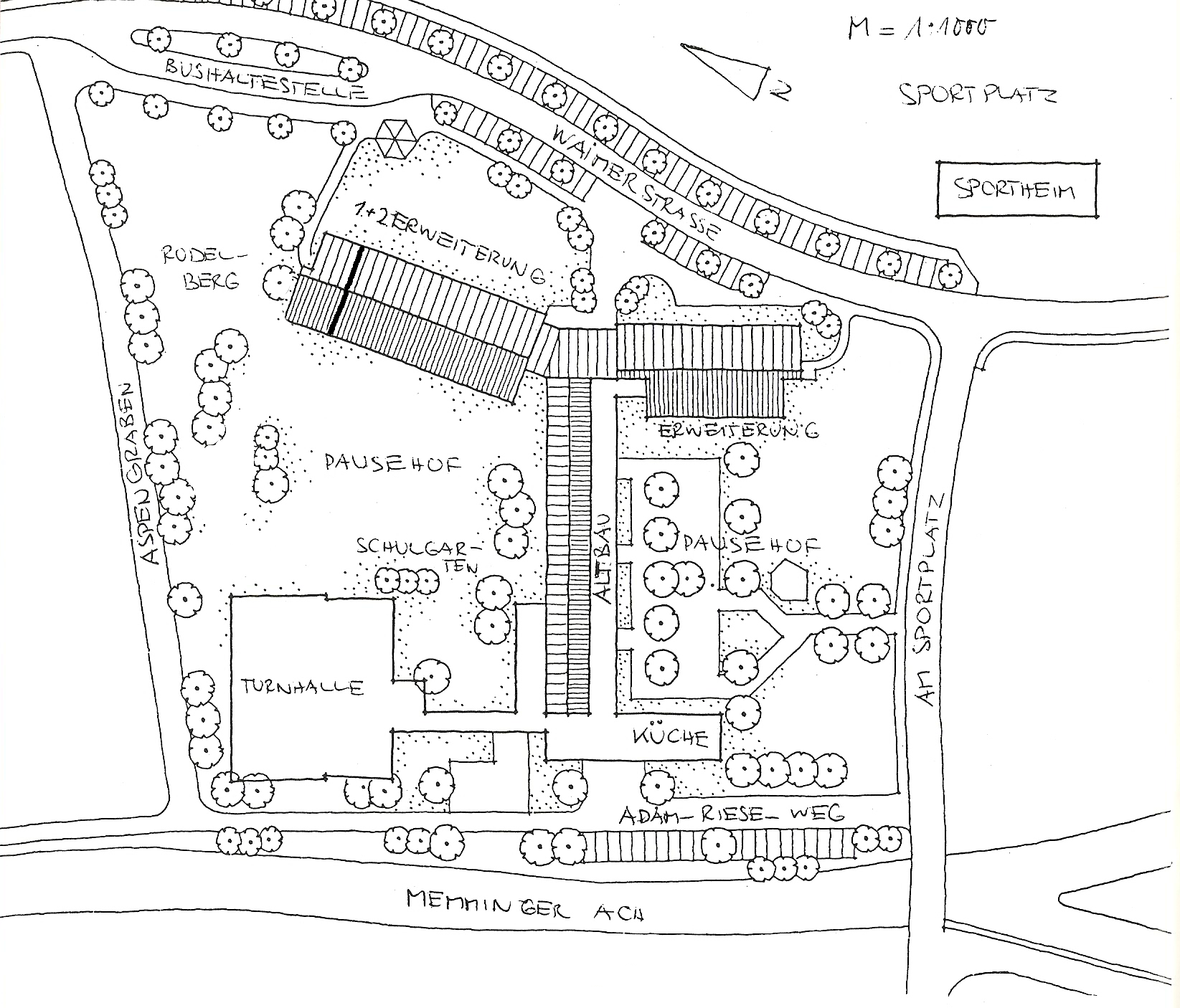 Lageplan der Volksschule Amendingen